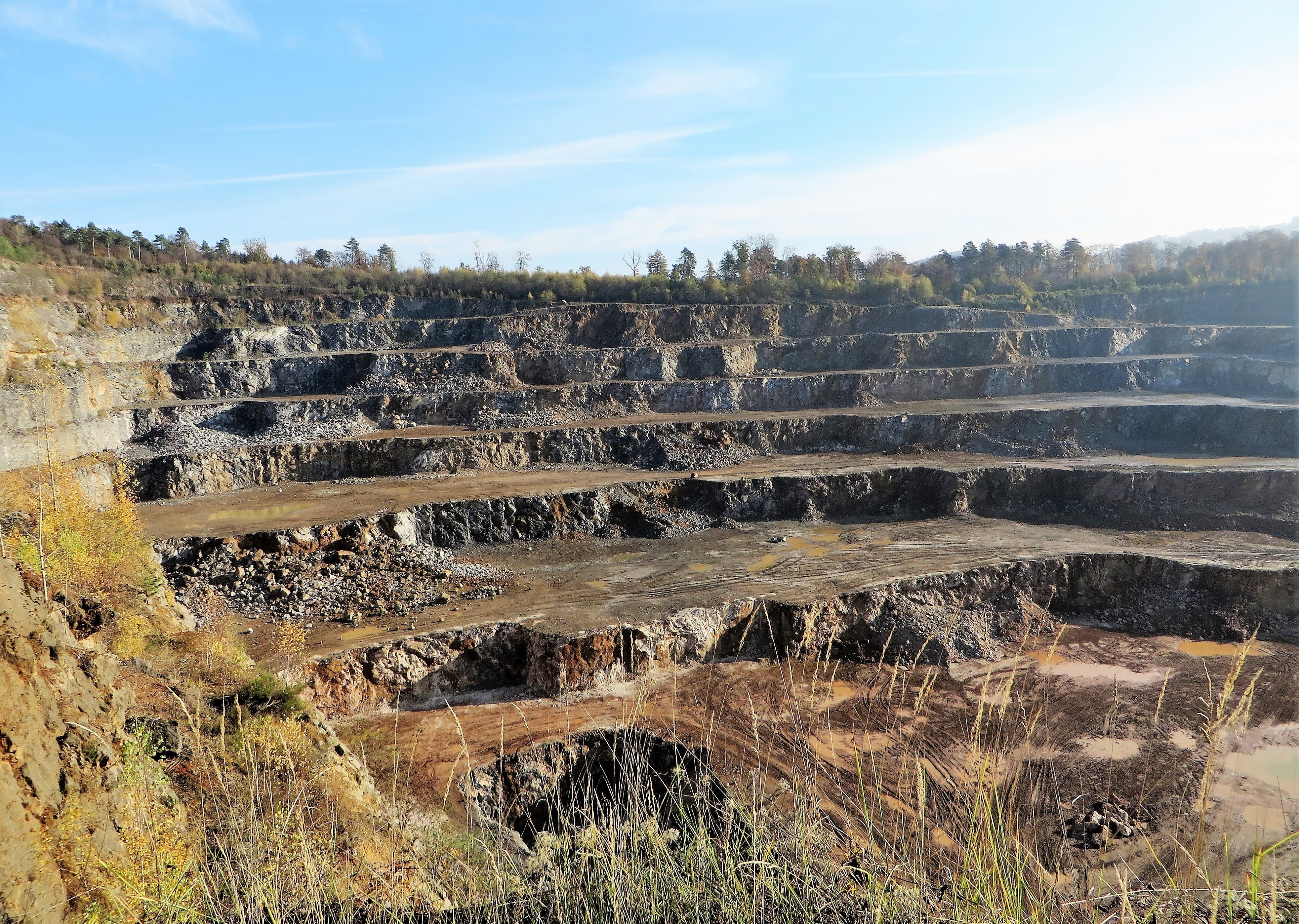 Kalksteinbruch der Hohenlimburger Kalkwerke GmbH im Hagener Stadtteil Hohenlimburg, Aussichtspunkt am Steltenberg. Der Steinbruch liegt am Nordrand eines Massenkalkvorkommens das vor etwa 380 Millionen Jahren im höheren Mitteldevon (Givet-Stufe) gebildet wude. Aus dem ehemaligen großen Korallenriff werden Kalk und Dolomitsteine abgebaut. Stellenweise treten Karstschlotten auf, die mit jüngeren Sedimenten gefüllt sind, wie Sande, Schliffe, Tone, Grünsand und Quarzkiese. Der abgebildete Bereich liegt im Landschaftsschutzgebiet „Steltenberg, Oege“.